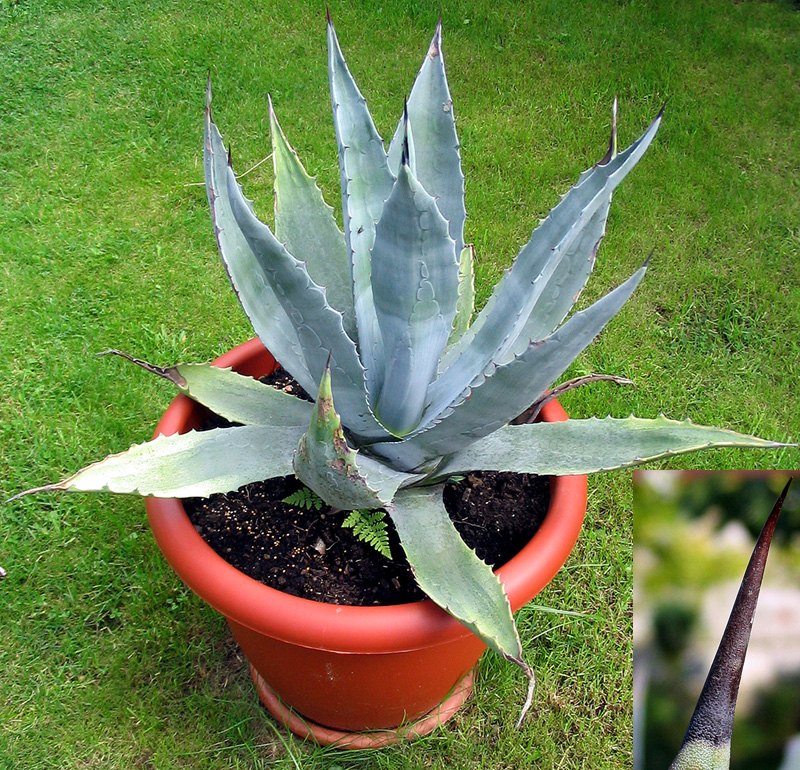 Beschreibung: Agave deserti Fotograf: Darkone, 28. August 2004